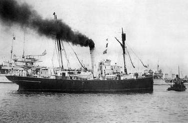 Transporte ARA 1° de Mayo